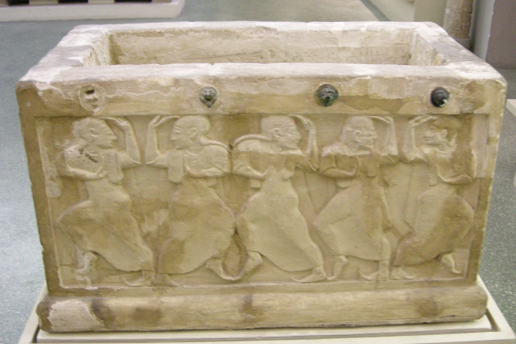 Urnetta cineraria da chiusi con scene di banchetto, 520 ac. circa